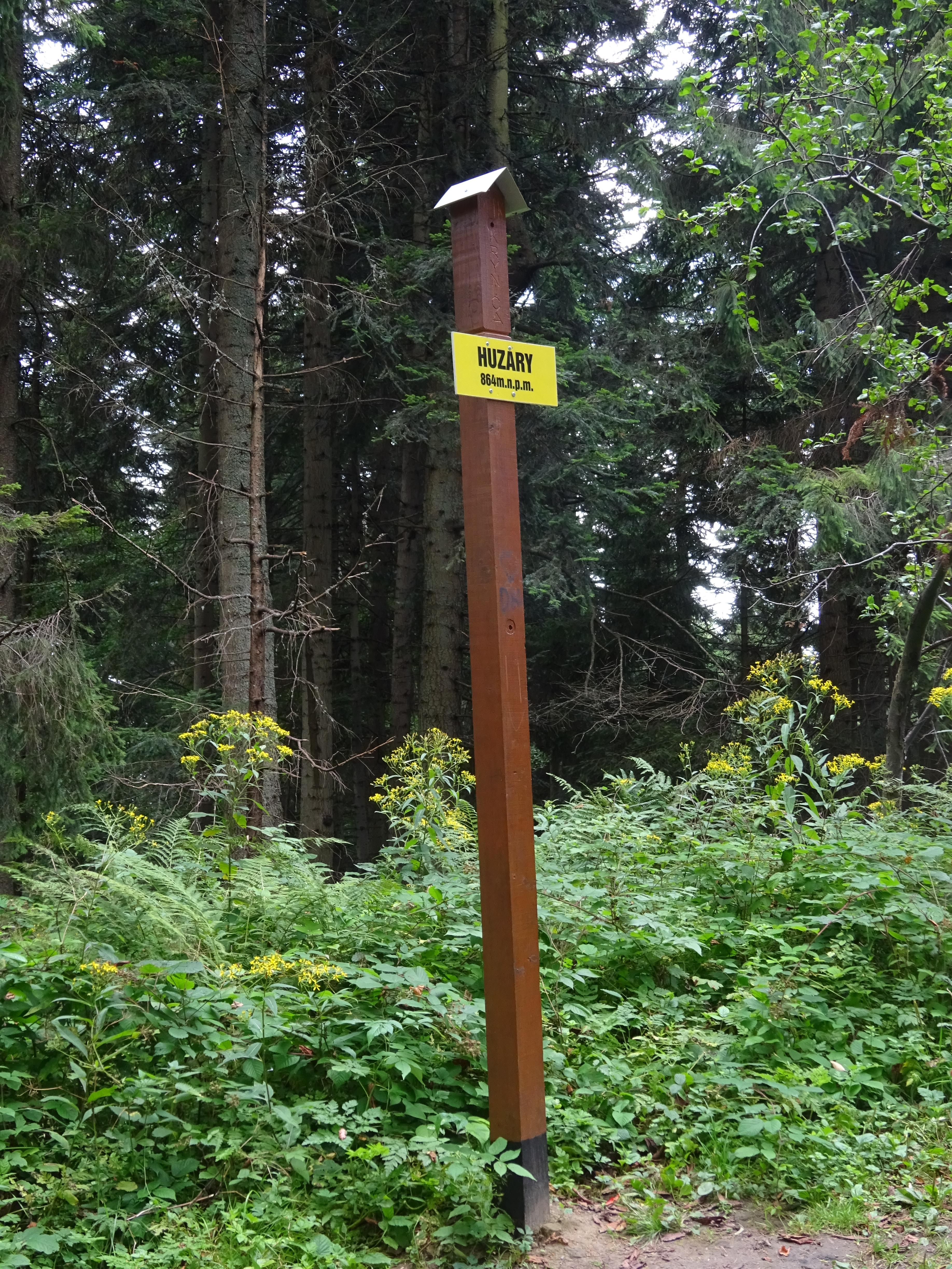 Słupek z tabliczką na szczycie Huzarów w Paśmie Jaworzyny Beskidu Sądeckiego. 2017